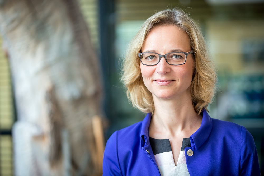 Katja Wolf